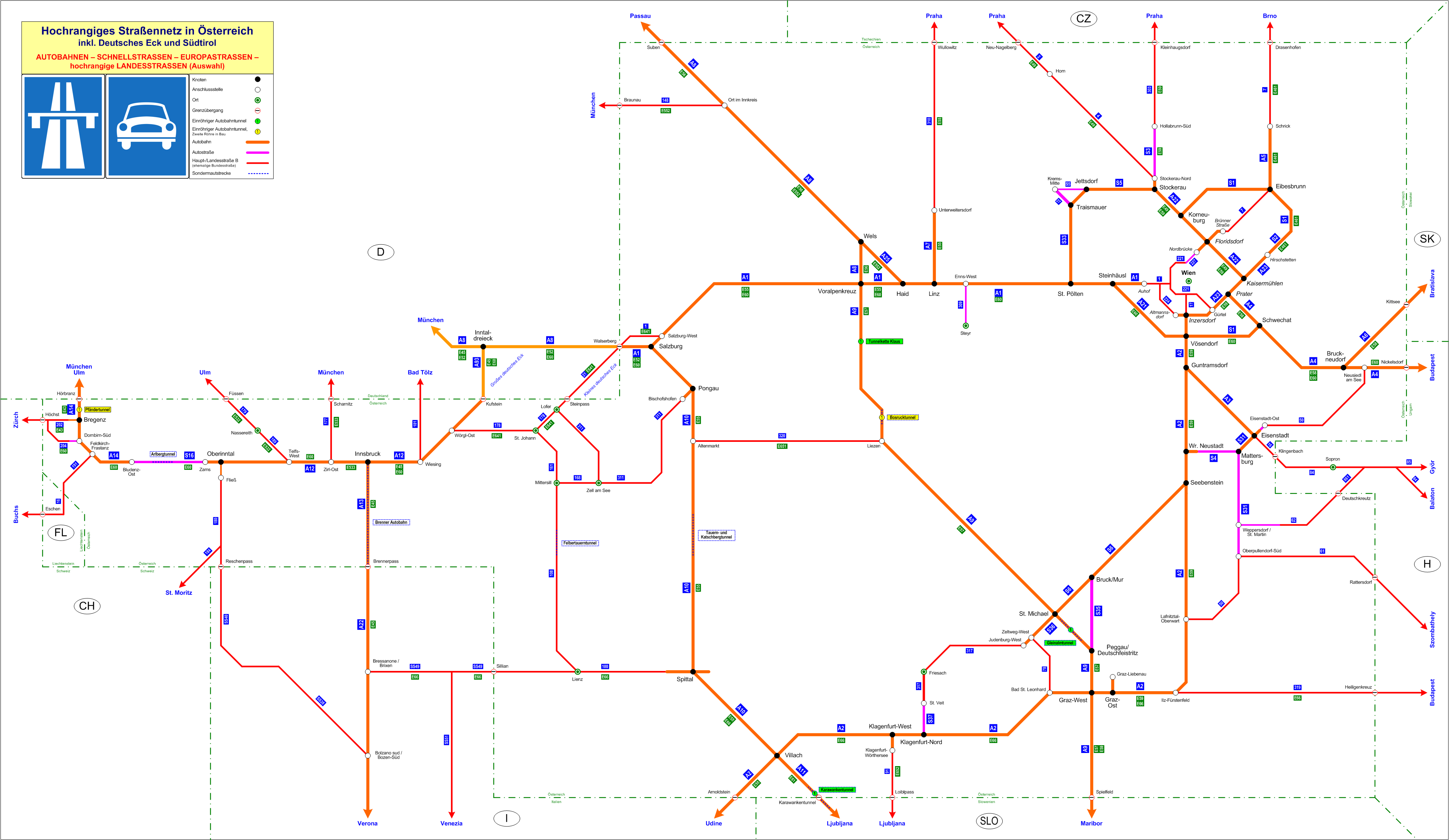 Hochrangiges Straßennetz in Österreich inkl. Deutsches Eck und Südtirol Bezeichnungen innerhalb von Wien in kursiv